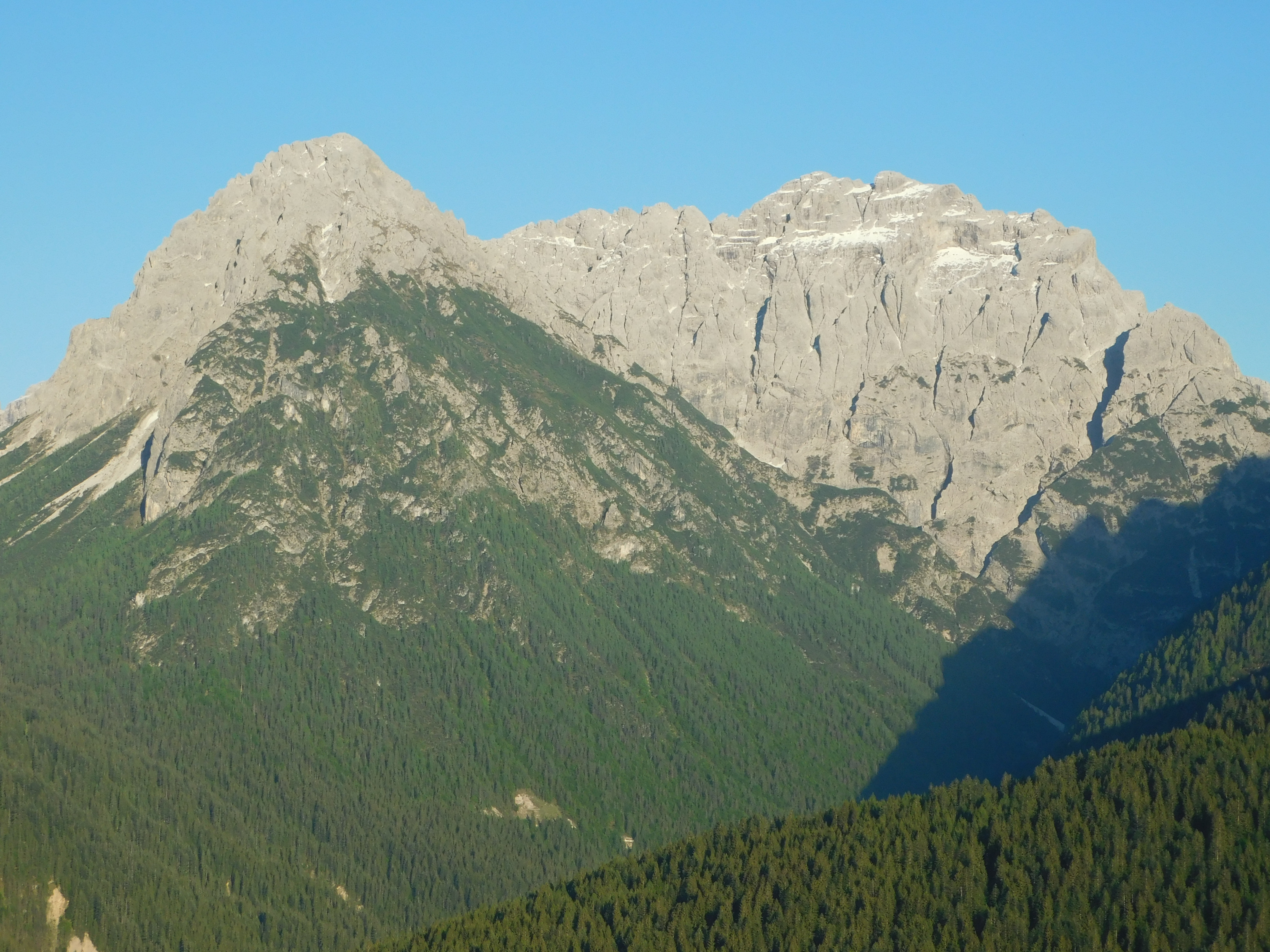 Il Monte Terza Grande e la sua imponente parete nord. Sulla sinistra il Monte Terza Media.